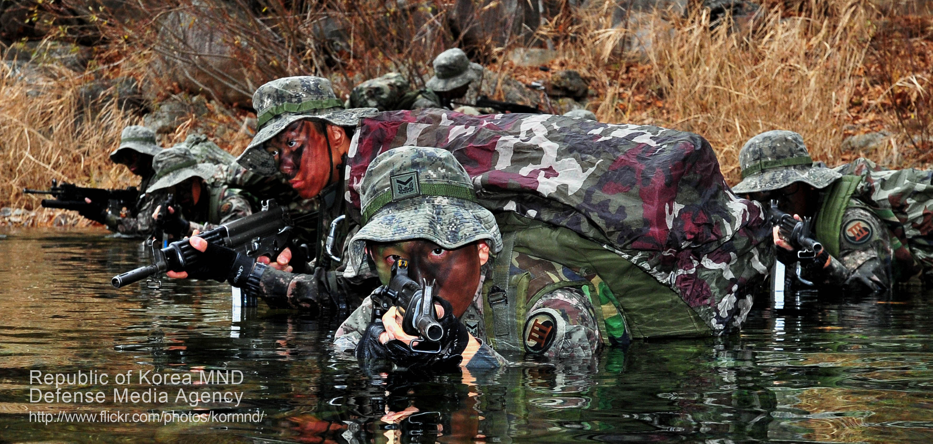 육군 3군단 특공연대 장병들이 강원도 인제군 미시령 일대 한 계곡에서 적지종심작전 수행능력 향상을 위해 숨직인 채 물속을 헤치며 수상침투훈련을 하고있다. 촬영 - 박흥배 기자